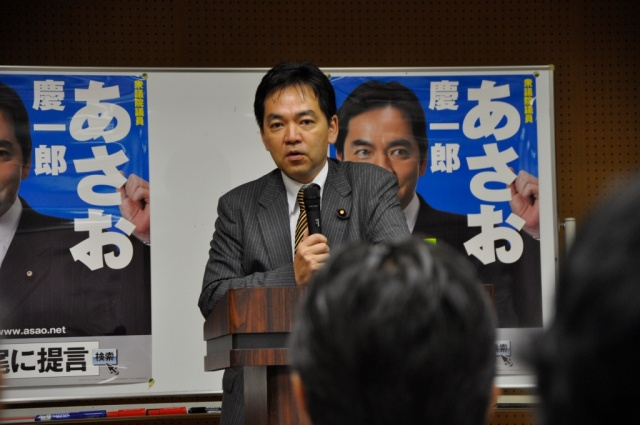 浅尾氏タウンミーティング